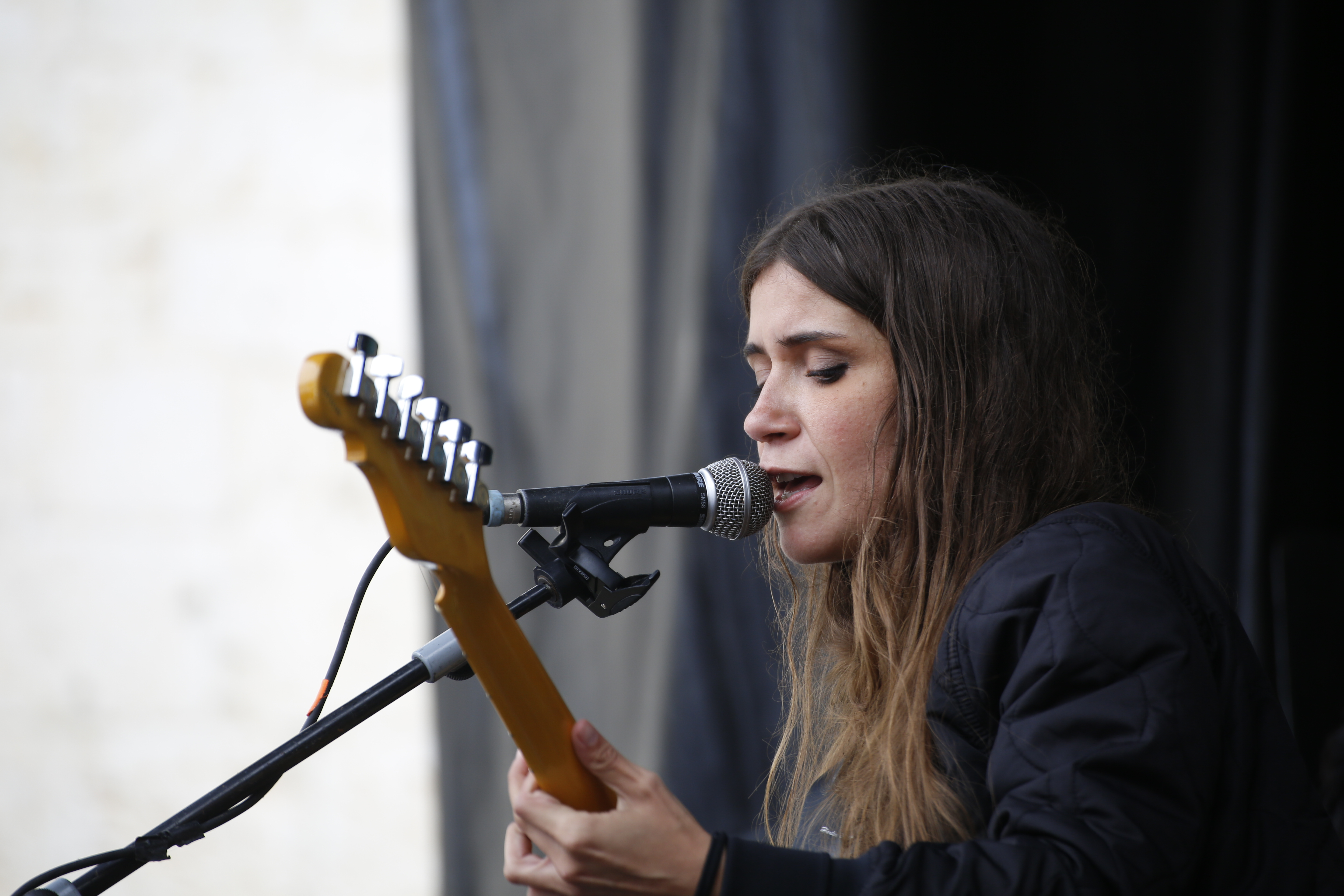 Concierto de Carmen Boza en el festival Palencia Sonora 2018.